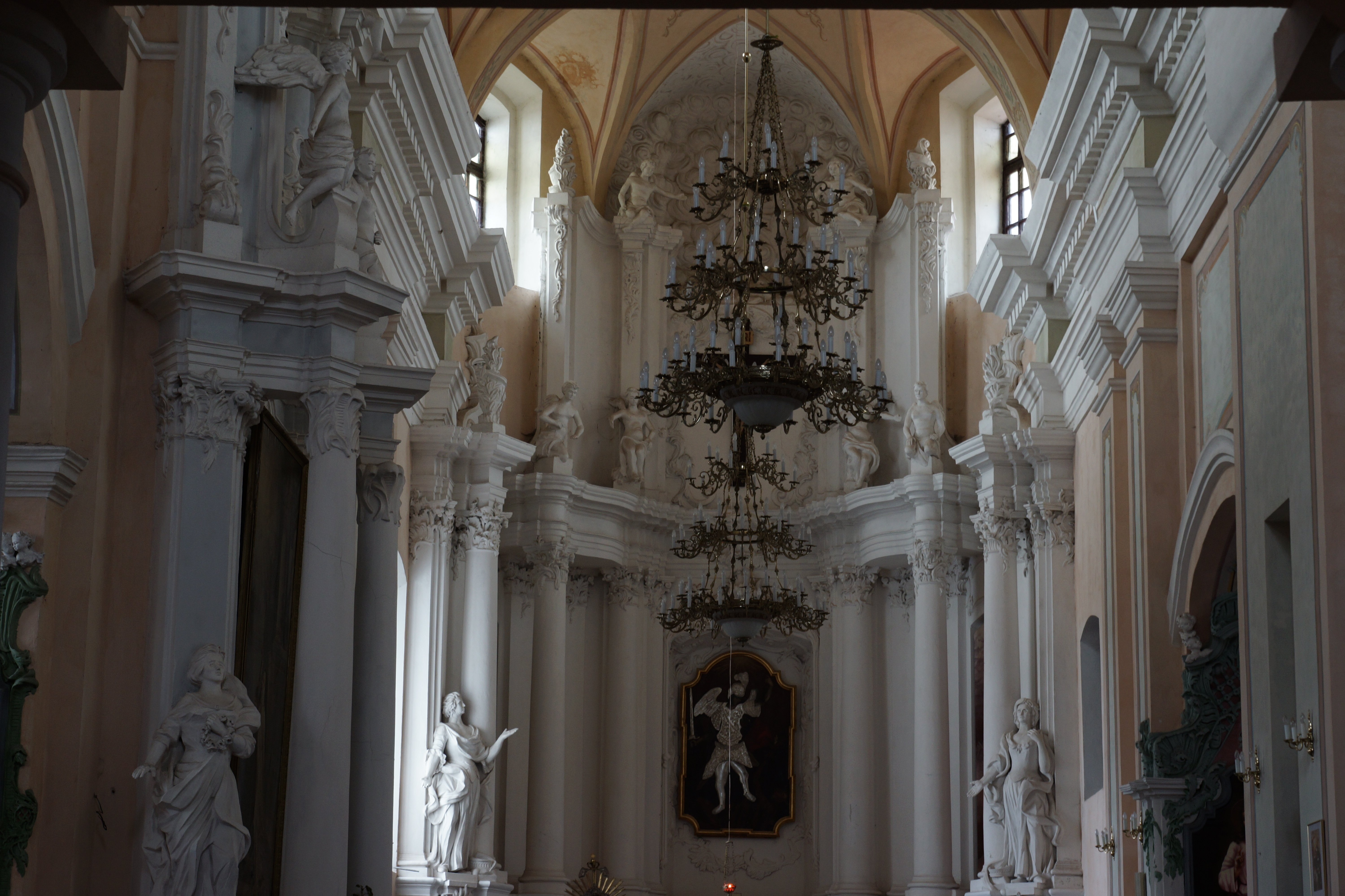 Беларуская (тарашкевіца): Міхайлаўскі касьцёл былога кляштара дамініканцаў. г. Наваградак This is a photo of Belarusian heritage monument. Reference number: 411Г000437 ( WLM)